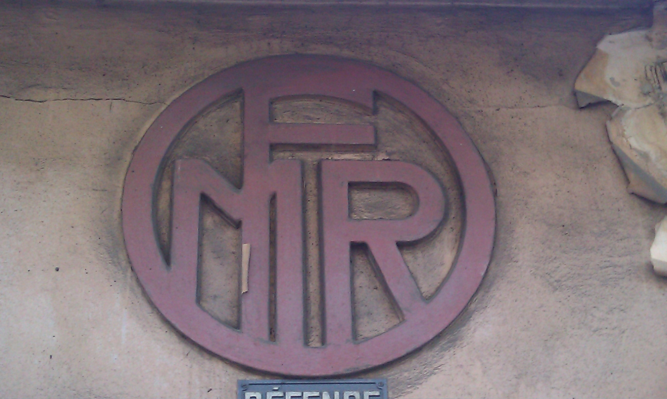 Logo des Forces Motrices du Rhône, sur un ancien transformateur électrique à Villeurbanne.